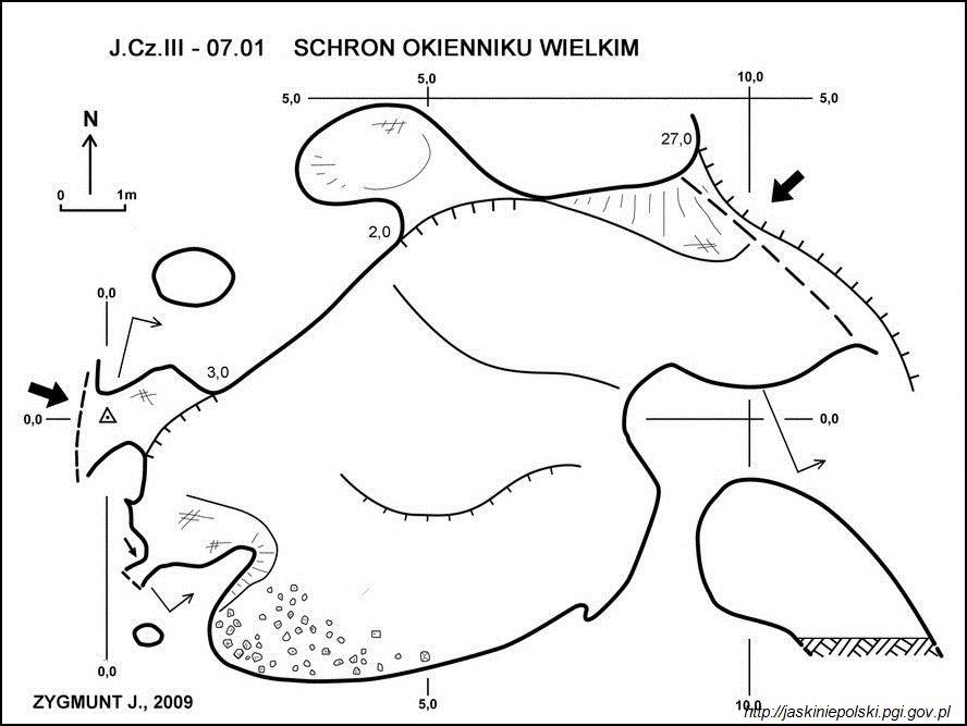 Schron z Matką Boską w Brodle - plan